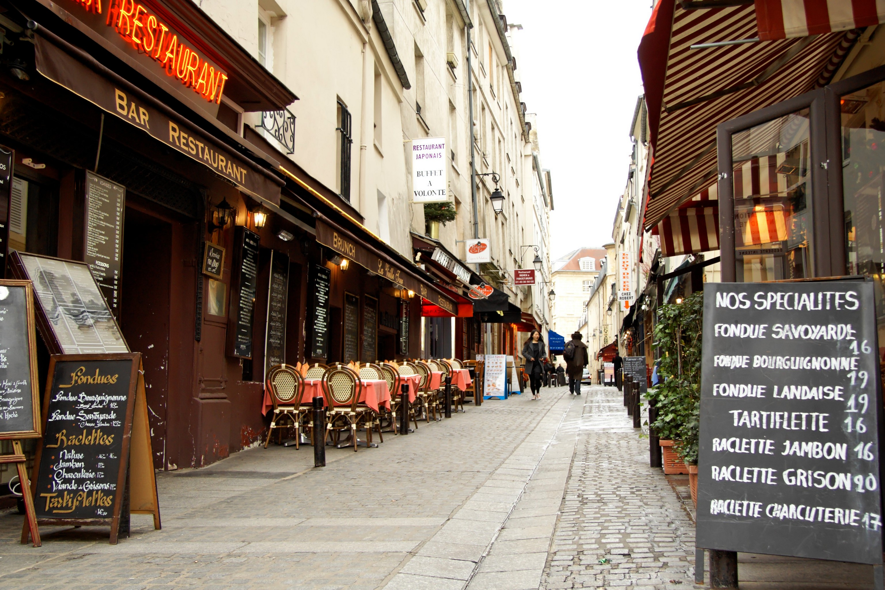 Les restaurants de la rue Mouffetard (Paris 5)